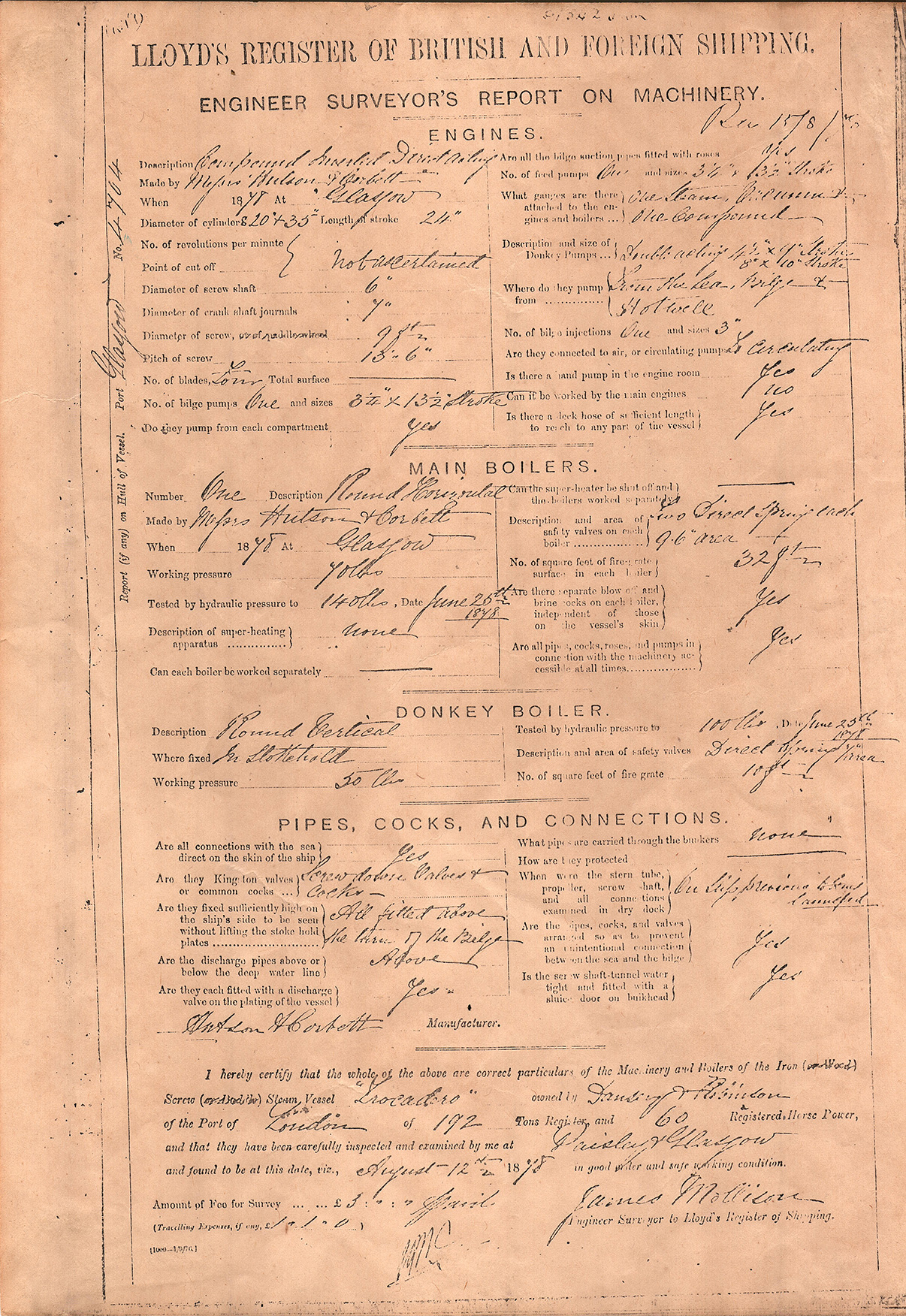 Bandırma Vapuru'nun inşasının ardından alınan orijinal Lloyd's belgesi.